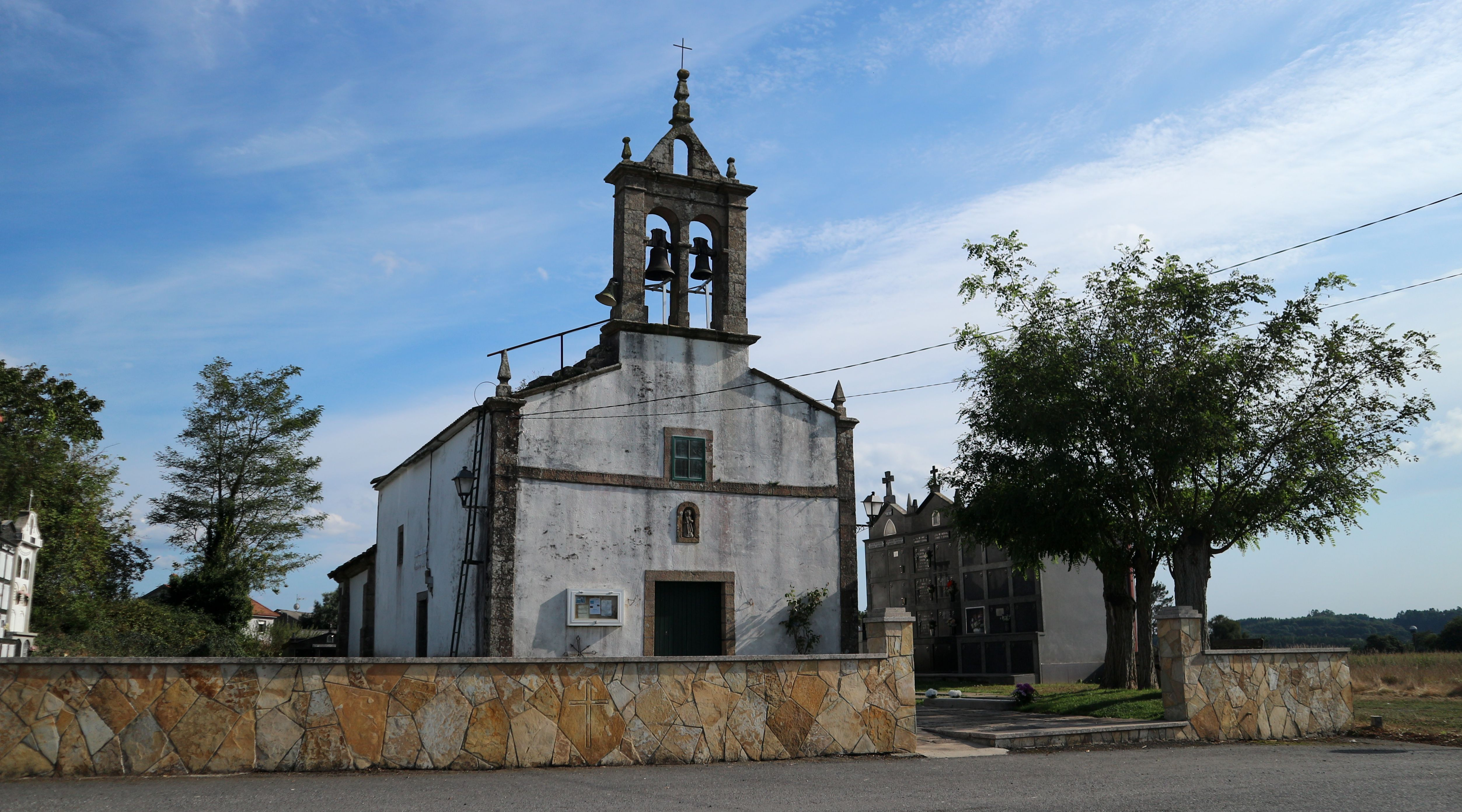 Igrexa de Santaia de Pereira. Na Eirexe de Pereira, Ordes.